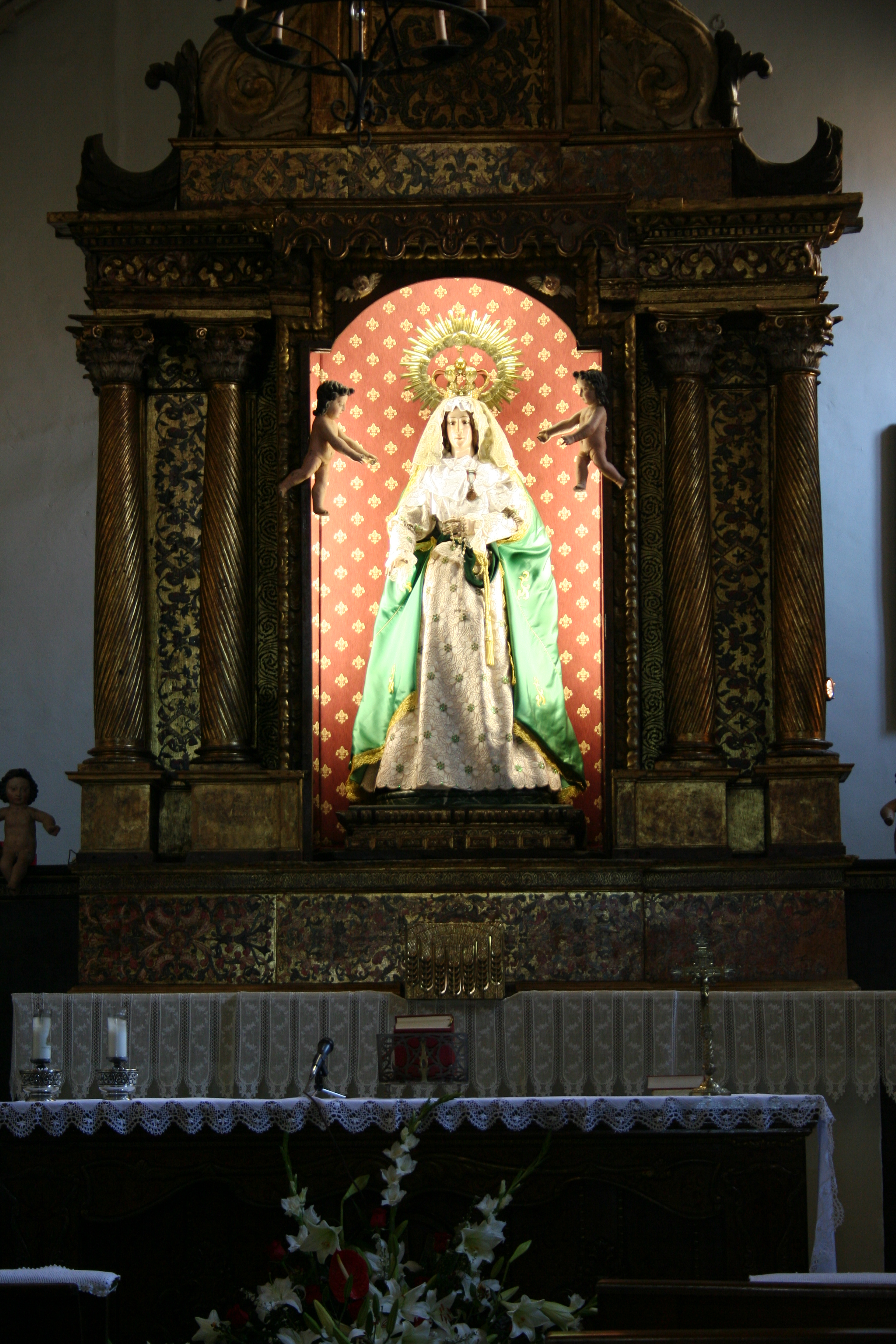 Imagen de la virgen de la Esperanza que se puede ver en la capilla de la Balesquida